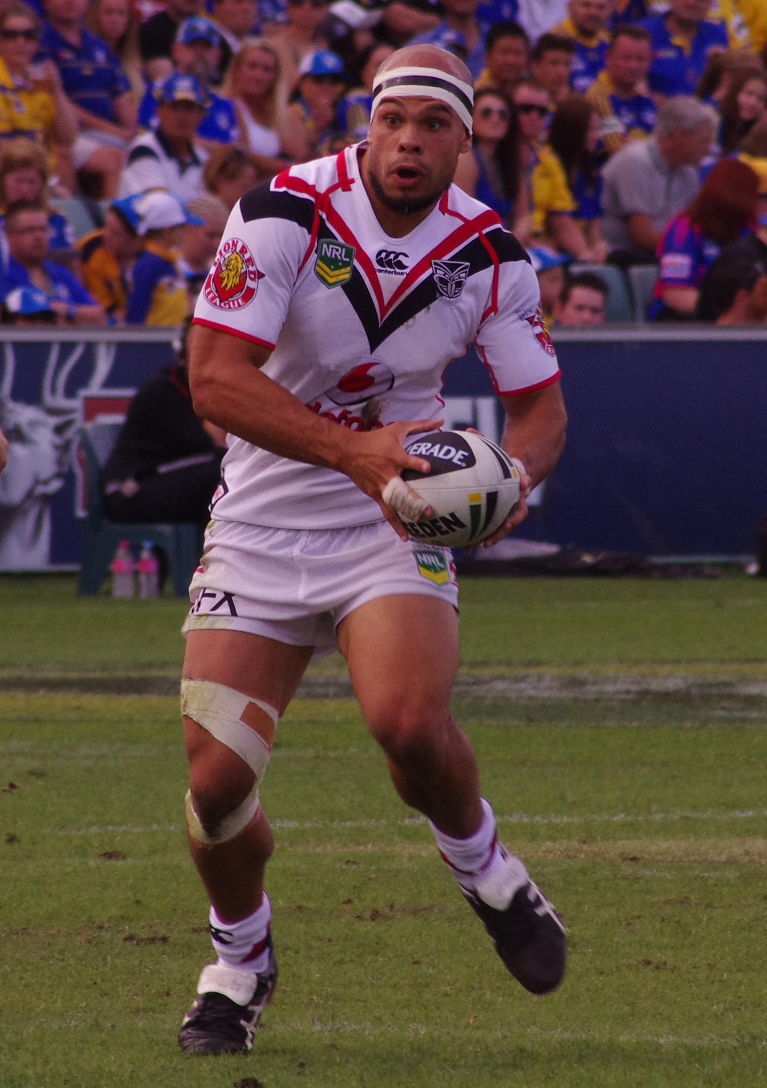 SAM RAPIRA